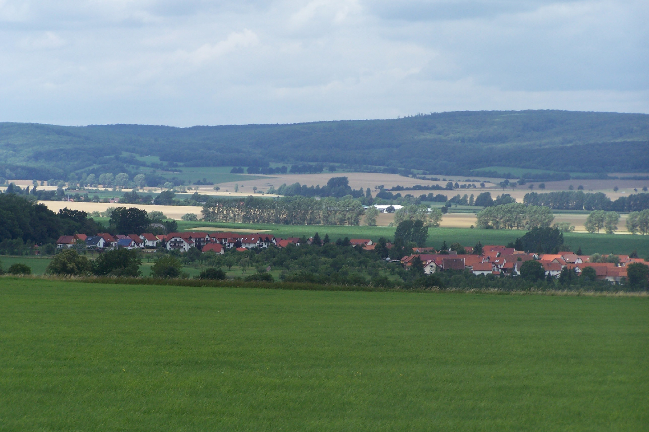 Der westliche Ortsrand von Haina mit der Neubausiedlung am Hainaer Holz (im Hintergrund der südliche Hainich.